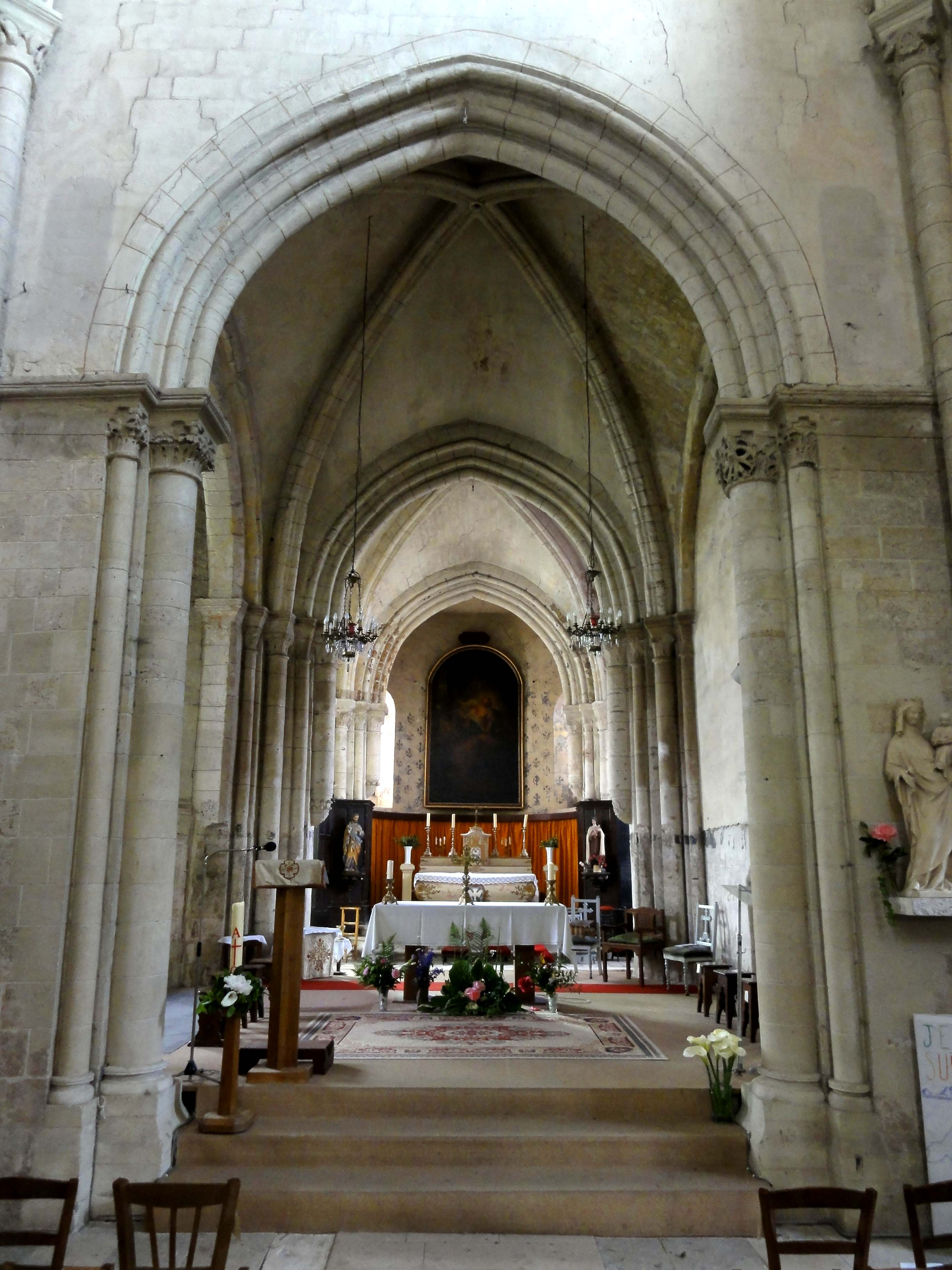 Intérieur de l'église Saint-Pierre-et-Saint-Paul (voir titre).